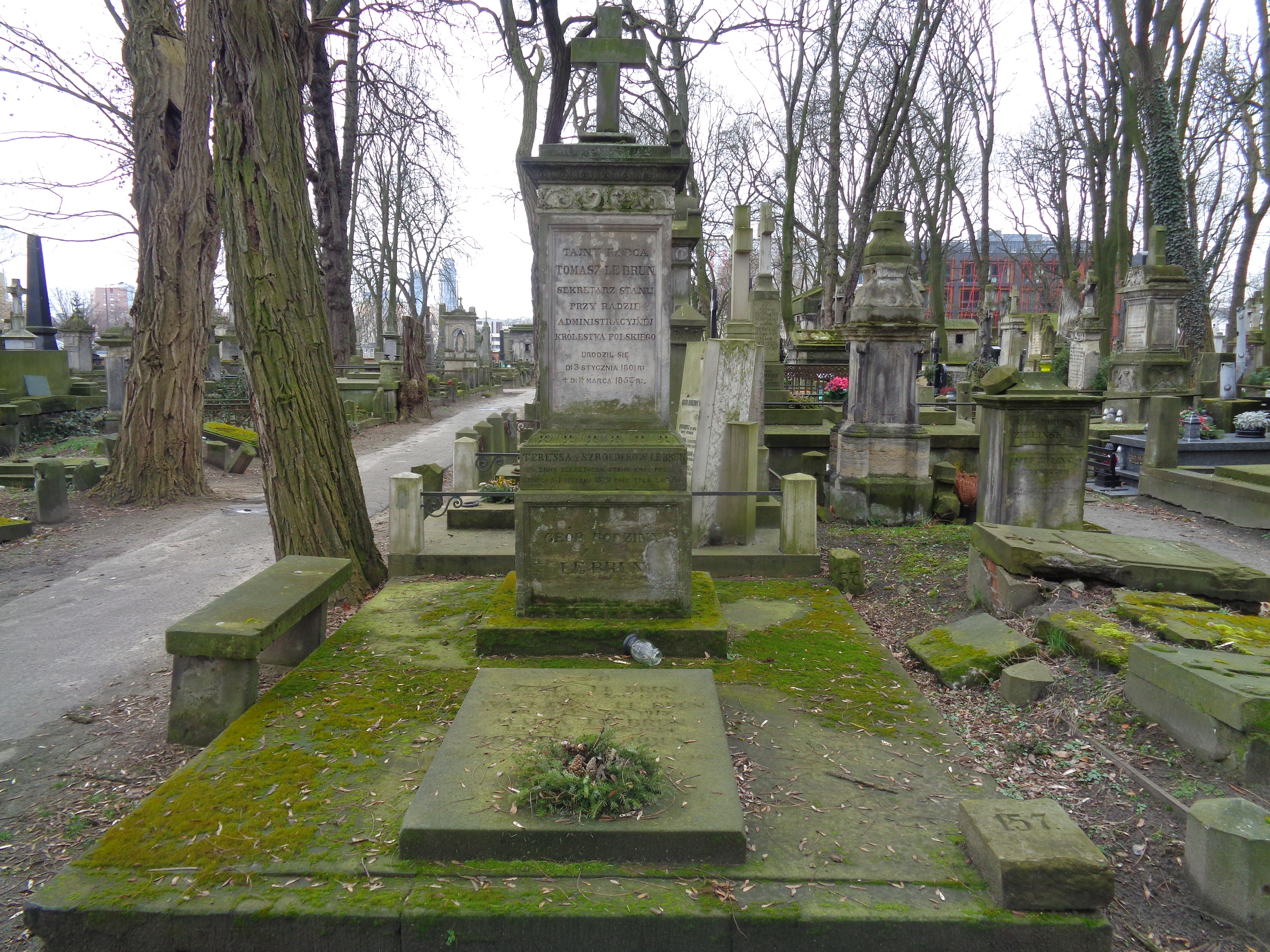 Grób :pl:Aleksandra le Brun na Cmentarzu Powazkowskim